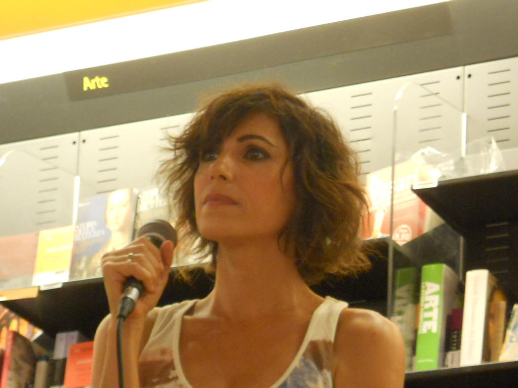 Giorgia alla Feltrinelli di Roma presenta il suo nuovo album